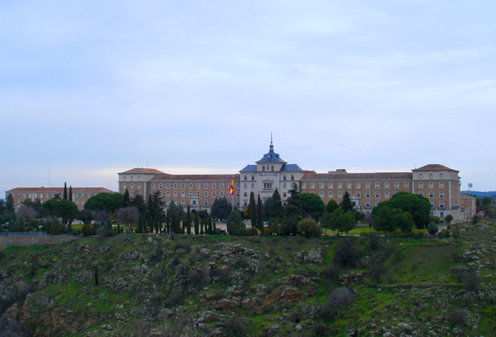 Academia de Infantería (ACINF) de Toledo